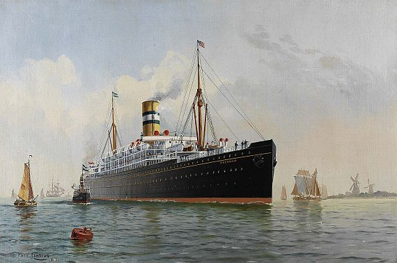 Der Passagierdampfer "Potsdam" wurde 1900 in Hamburg gebaut und lief für die Holland-Amerika Linie von Rotterdam nach New York